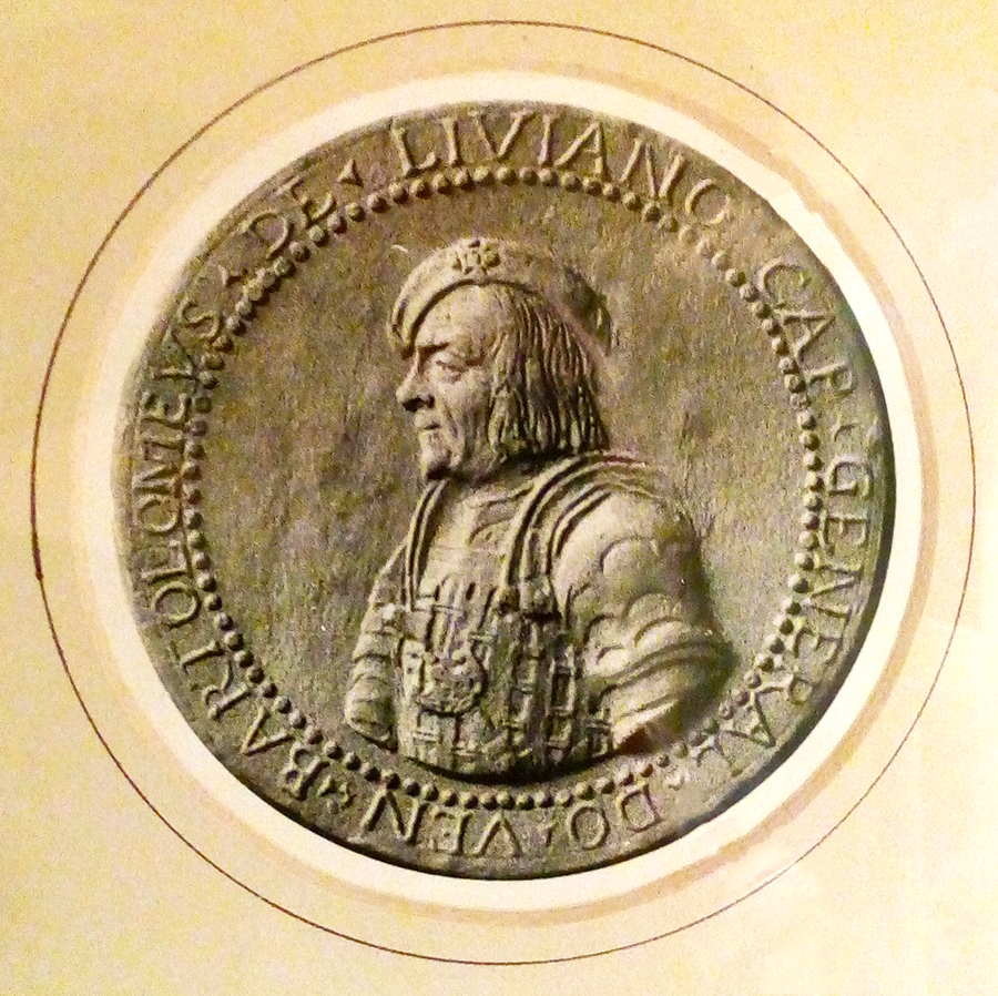 Bartolomeo d'Alviano in una medaglia (probabilmente realizzata quando era in vita)